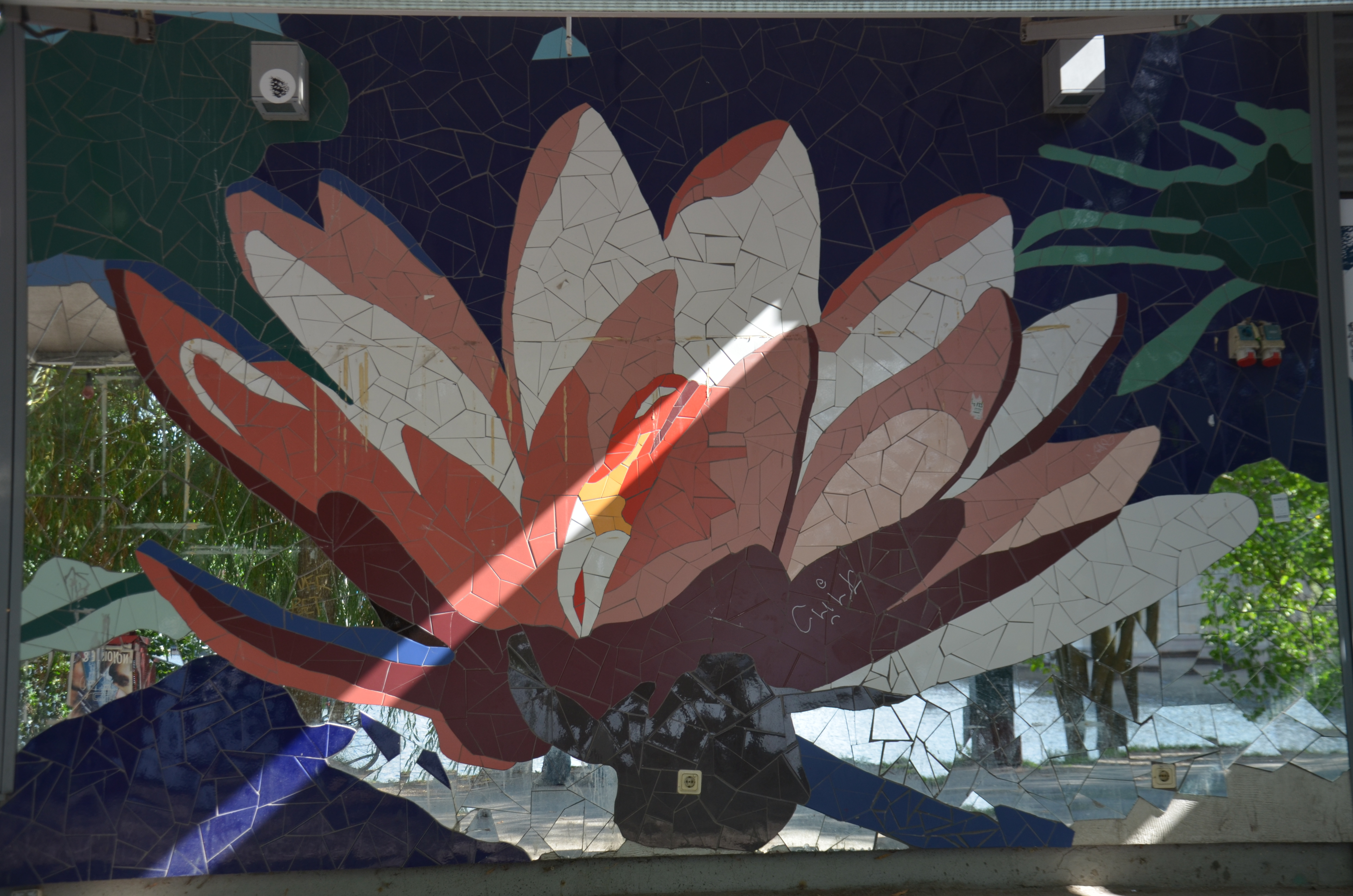 Miraculum vid Hornstulls strand i Stockholm, mosaik och spegelbitar, av Backa Carin Ivarsson och Monica Larsson, 2004